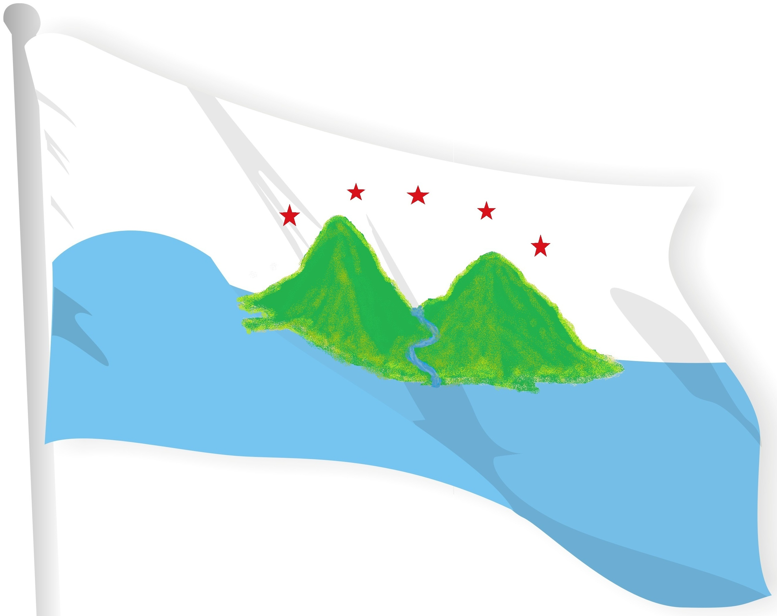 La bandera del municipio de la plata fue escogida de un concurso convocado por el centro plateño de historia . Consta de dos franjas: asul significa el color permanente del firmamento y lo ideales altruistas del plateño; y el blanco como metas de etica y moral del habitante del municipio y las minas de plata que dan origen al nombre. igualmente sobrepuestas se encuentran las montañas, que representan la situacon ubicada en las estribaciones de la cordillera central y la exuberancia de sus tierras. sobre las montañas hay cinco estrellas de color rojo, significado con ello las distintas luchas historicas acaeciadas en su suelo, desde la rebelion aborigen y las batallas libertadoras. fue adoptada mediante el decreto 048 de octubre 12 de 1977. fuente